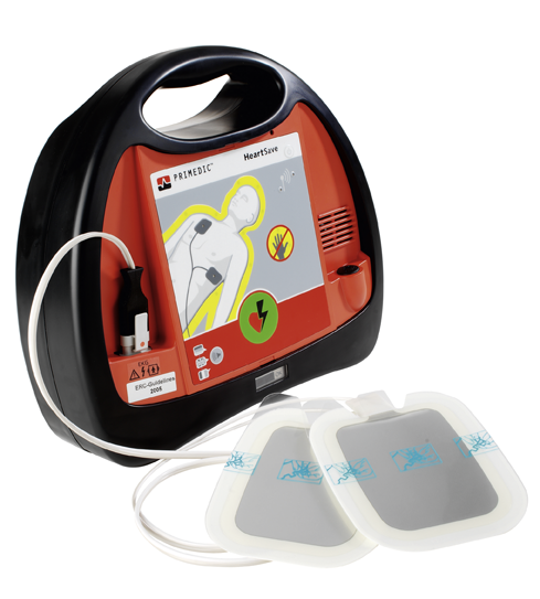 Automatisierter Externer Defibrillator (AED) mit angeschlossenen Klebeelektroden für den Einmalgebrauch